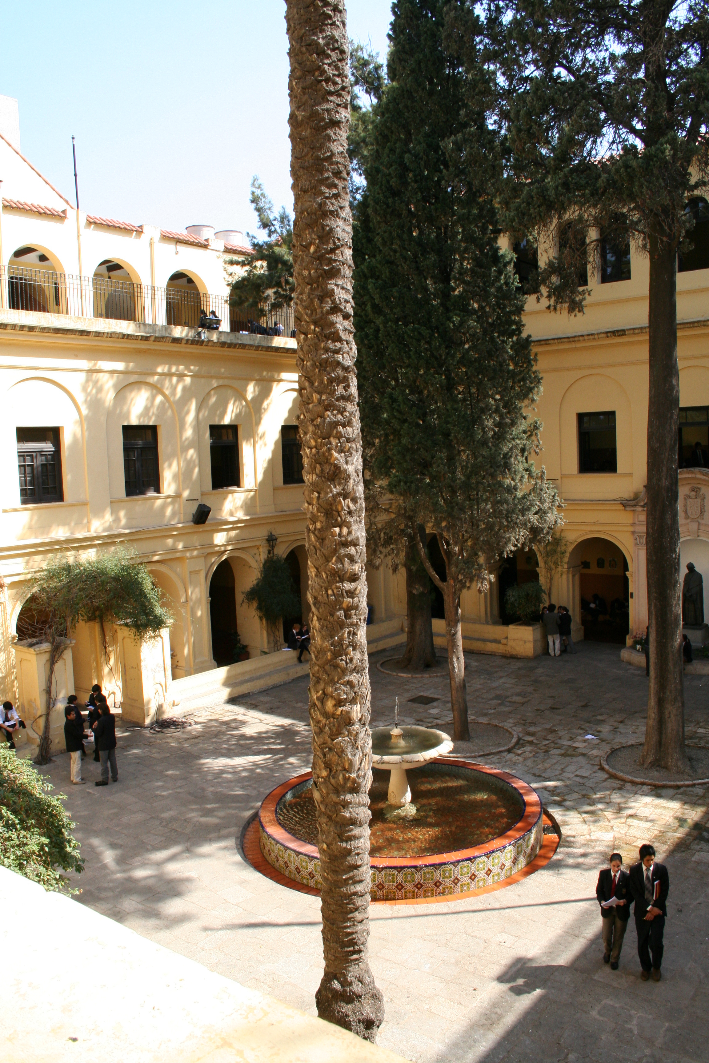 Colegio Monserrat courtyard, Córdoba, Argentina.